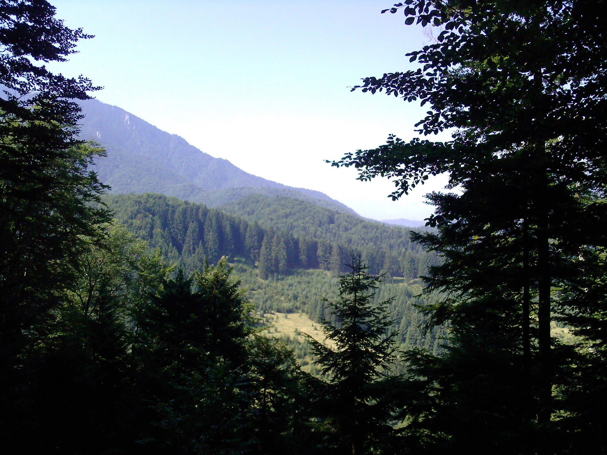 Masivul Piatra Mare (latura nord-estică)